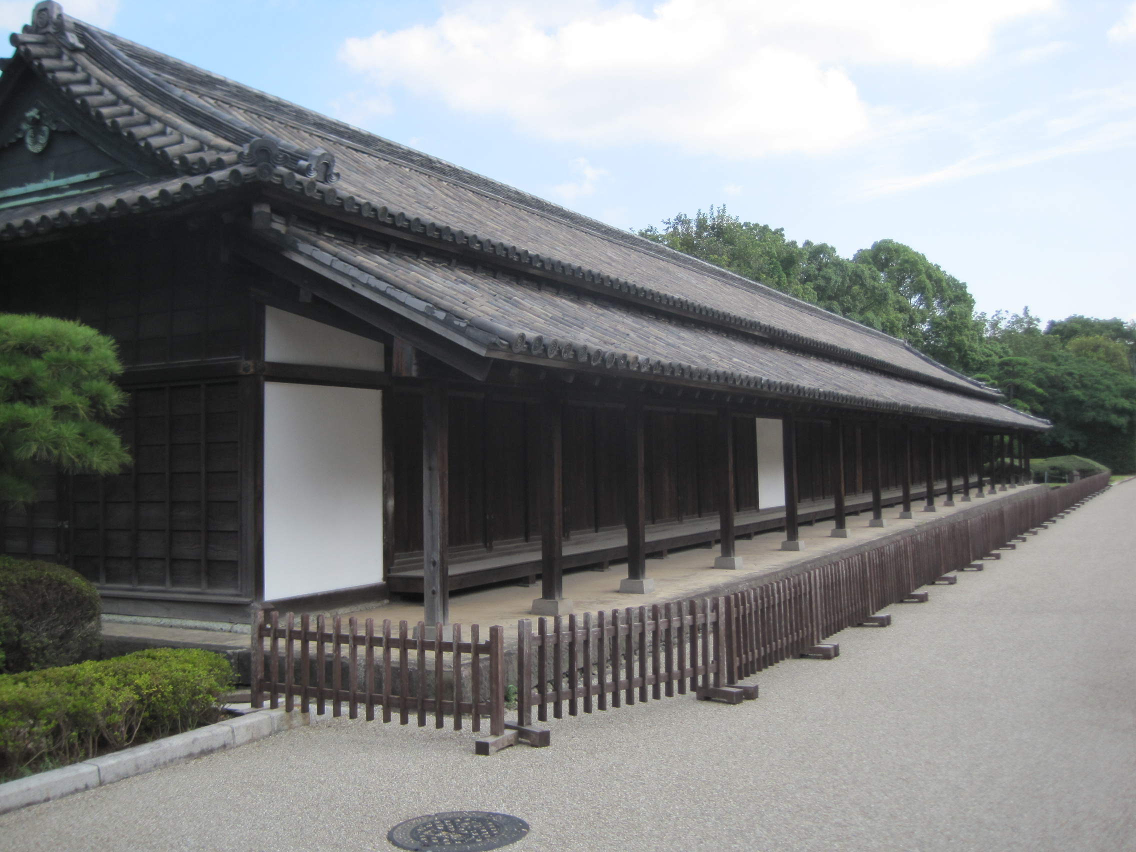 1 Chiyoda, Chiyoda-ku, Tōkyō-to 100-0001, Japan